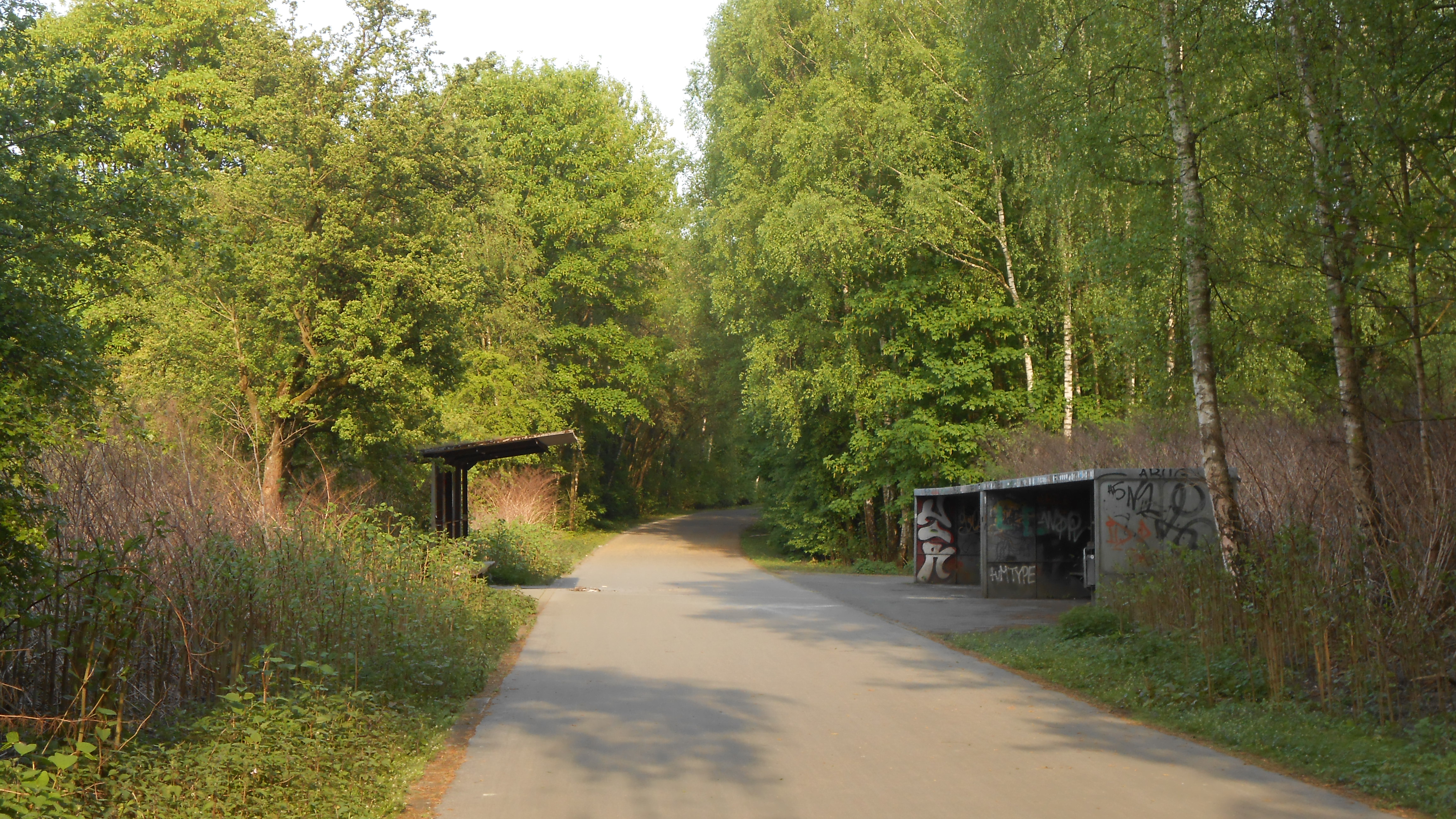 Auf der "Dortmunder Niere", eine Anfang der 1980er Jahre angelegte Radrenn-Rundstrecke unweit der Bundesstraße 54 und des Westfalenparks.